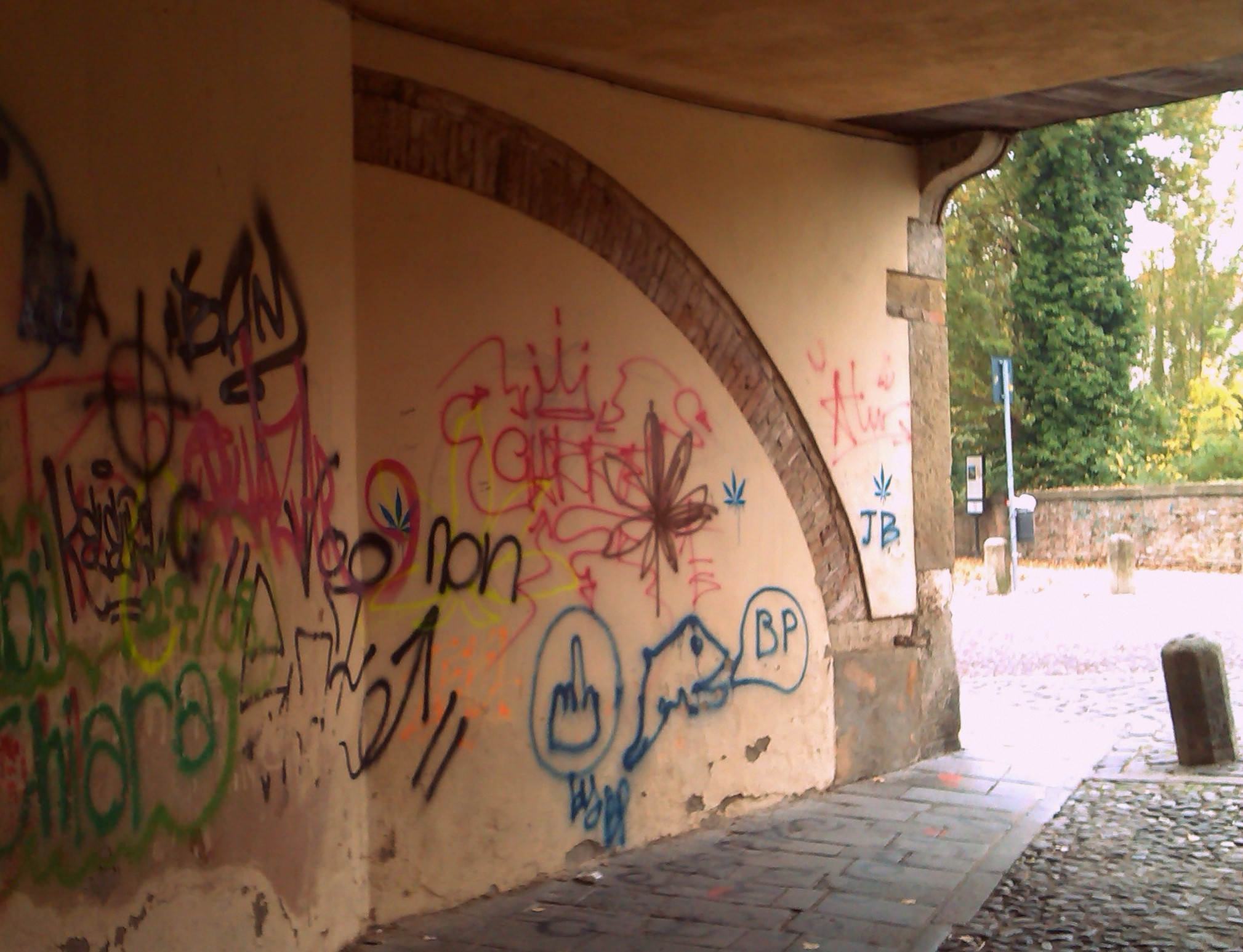 Fortificazione del Soccorso, Padova